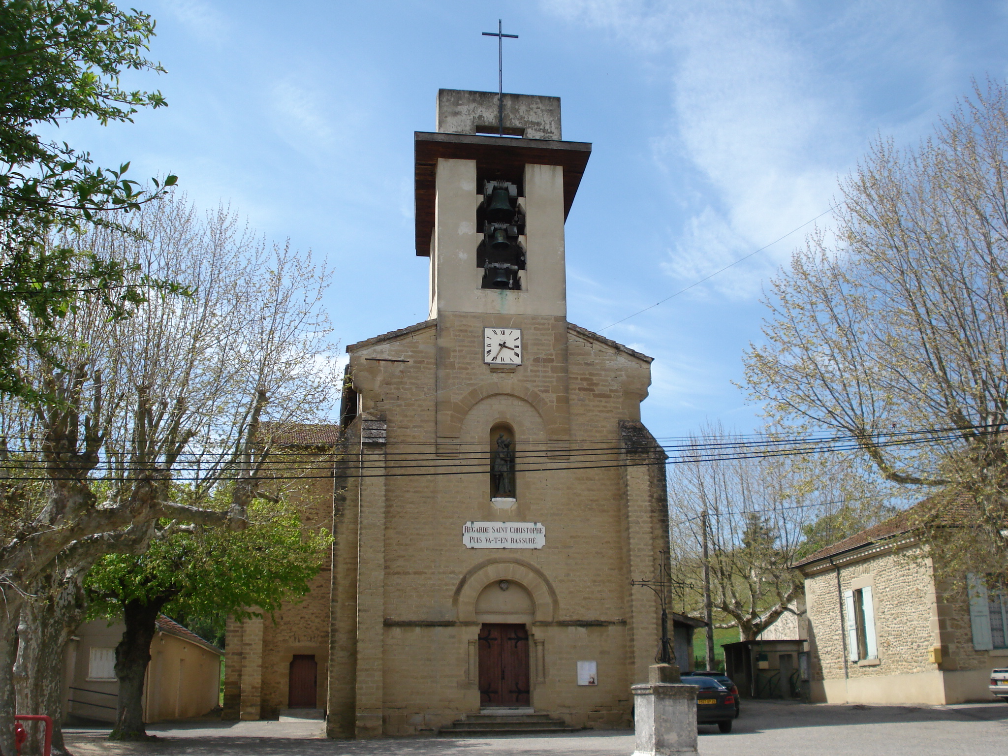 église de Saint-Christophe-et-le-Laris dans la Drôme